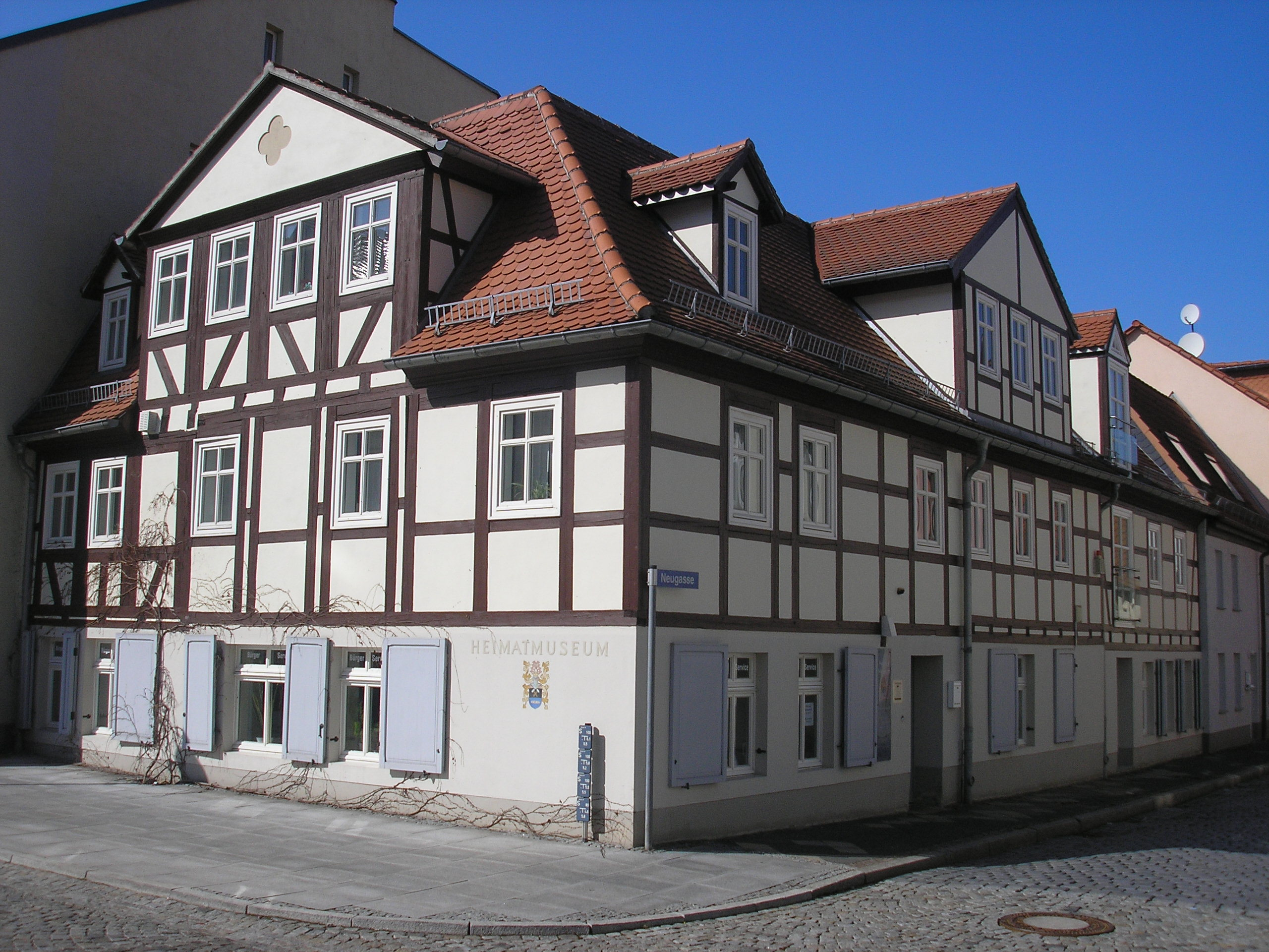 Das Heimatmuseum in Meuselwitz (Thüringen).